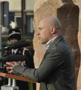 Beeldhouwer Jan-Carel Koster bij oorlogsmonument Exhortare tijdens de onthulling in Vriezeveen